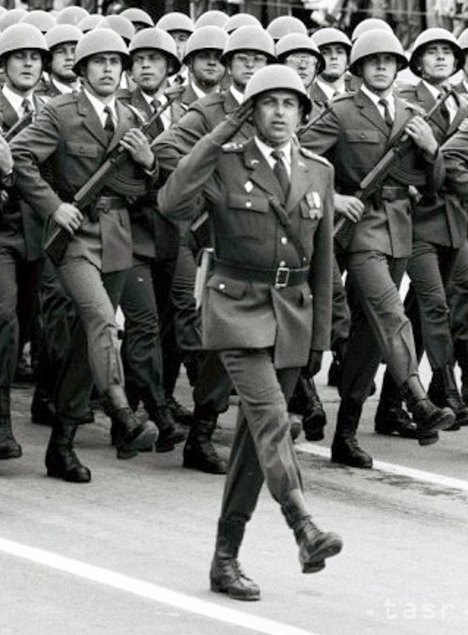 Slávnostná vojenská prehliadka 9.máj 1985. Bratislava. Slovensko. Digitalizácia dobového obrázku.